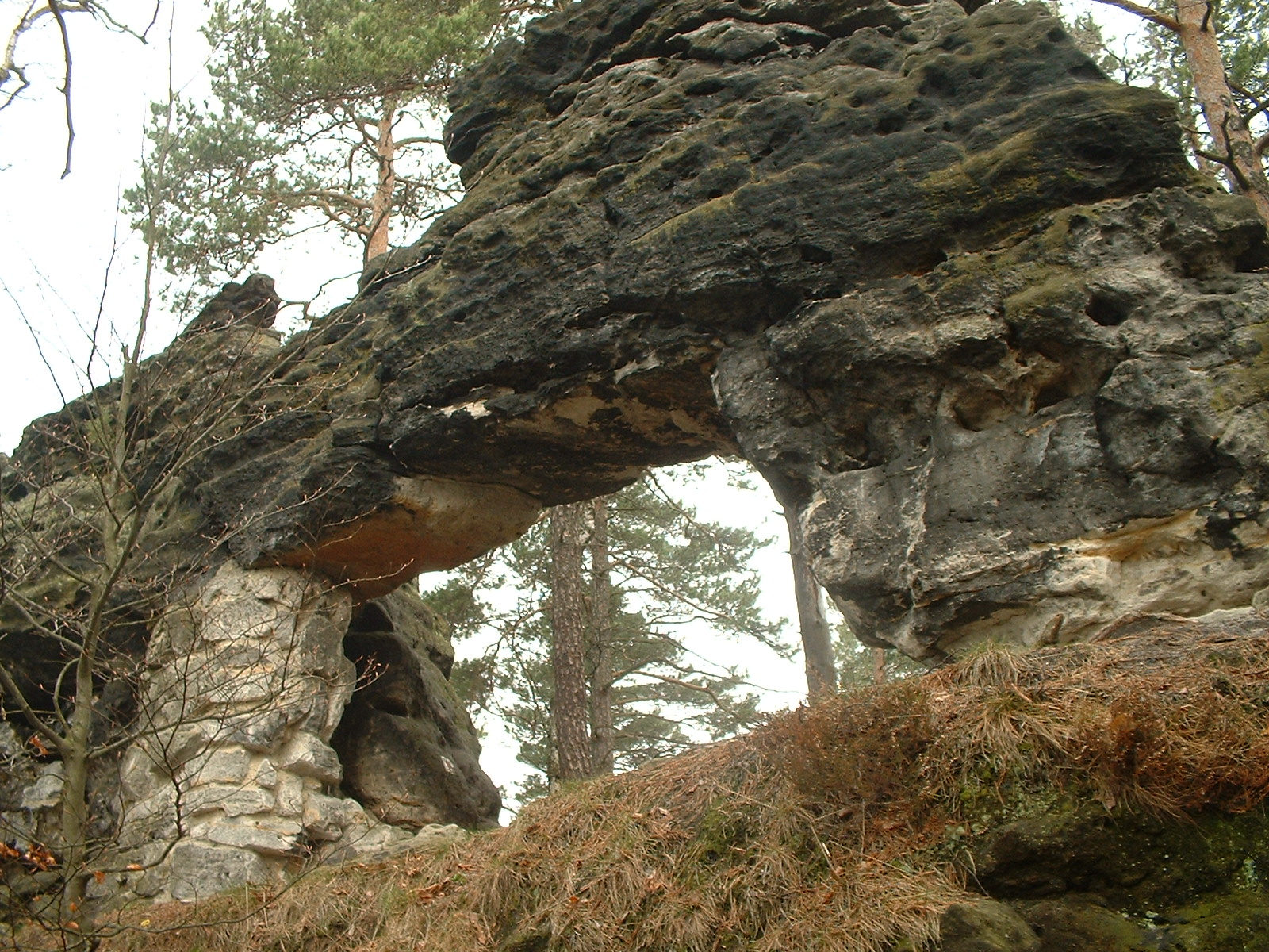 Das kleine Prebischtor in der Böhmischen Schweiz in Tschechien.